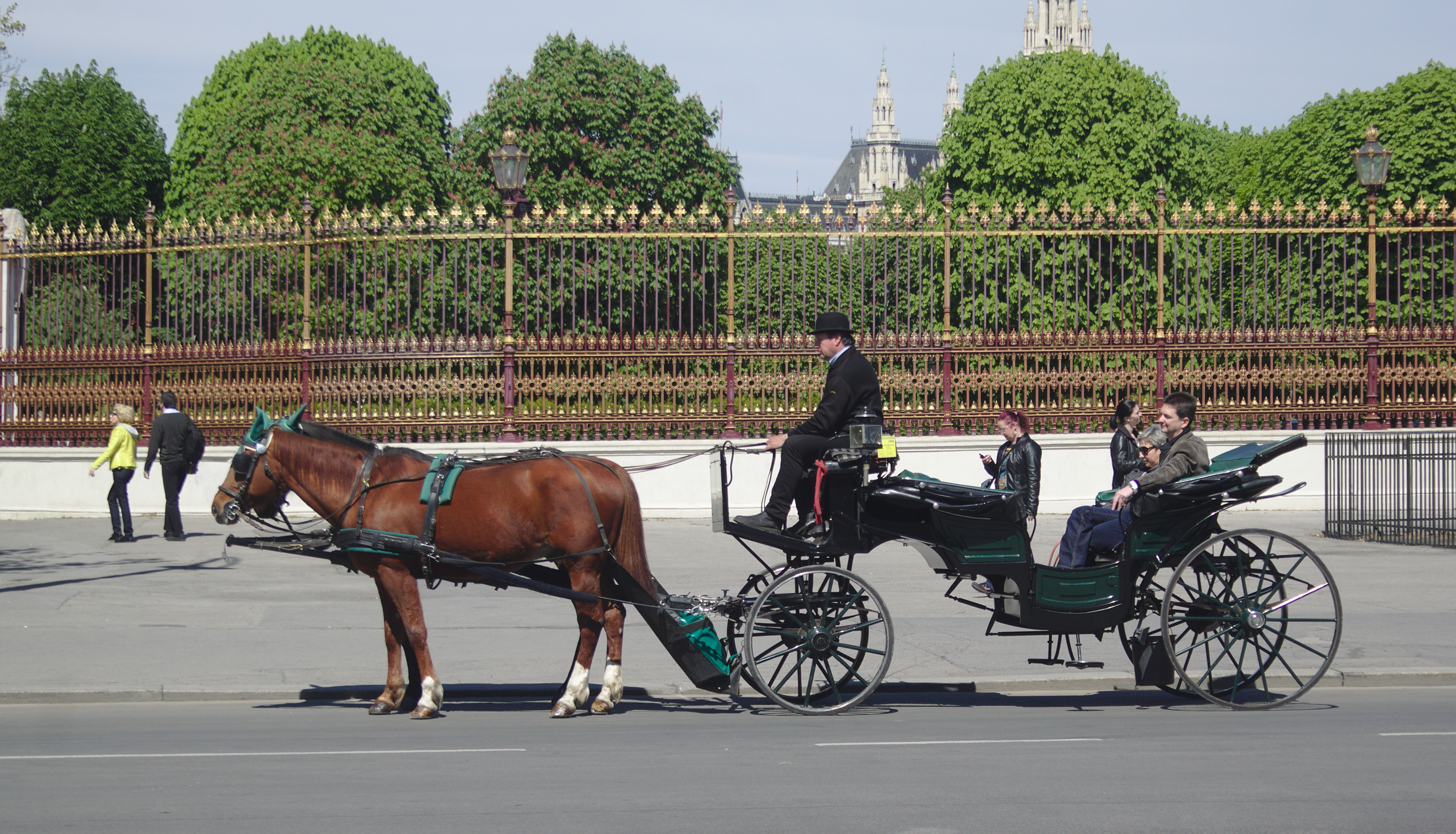 Fiaker am Heldenplatz zwischen Äußerem Burgtor und Burgring